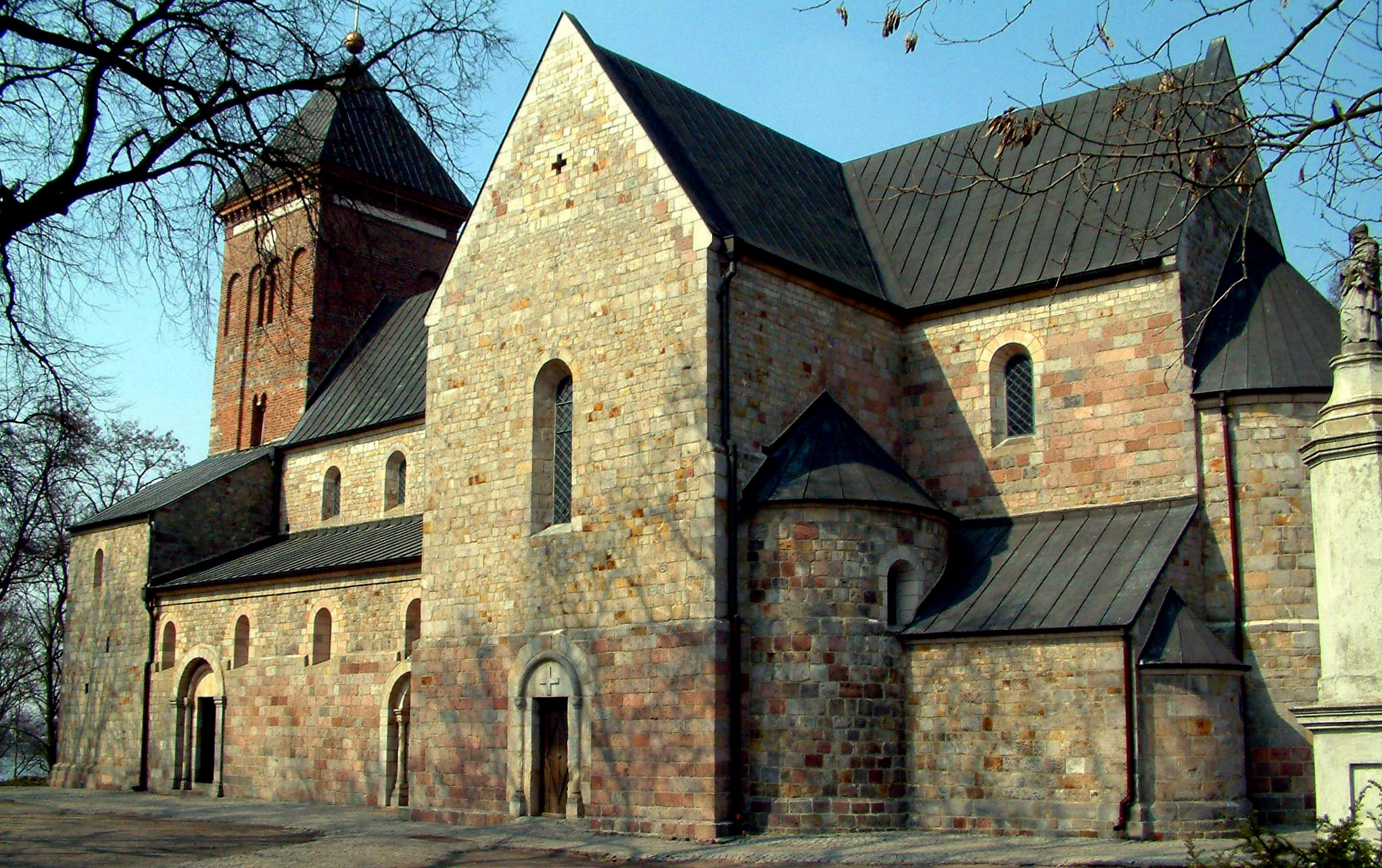 Kolegiata św. Piotra i Pawła w Kruszwicy